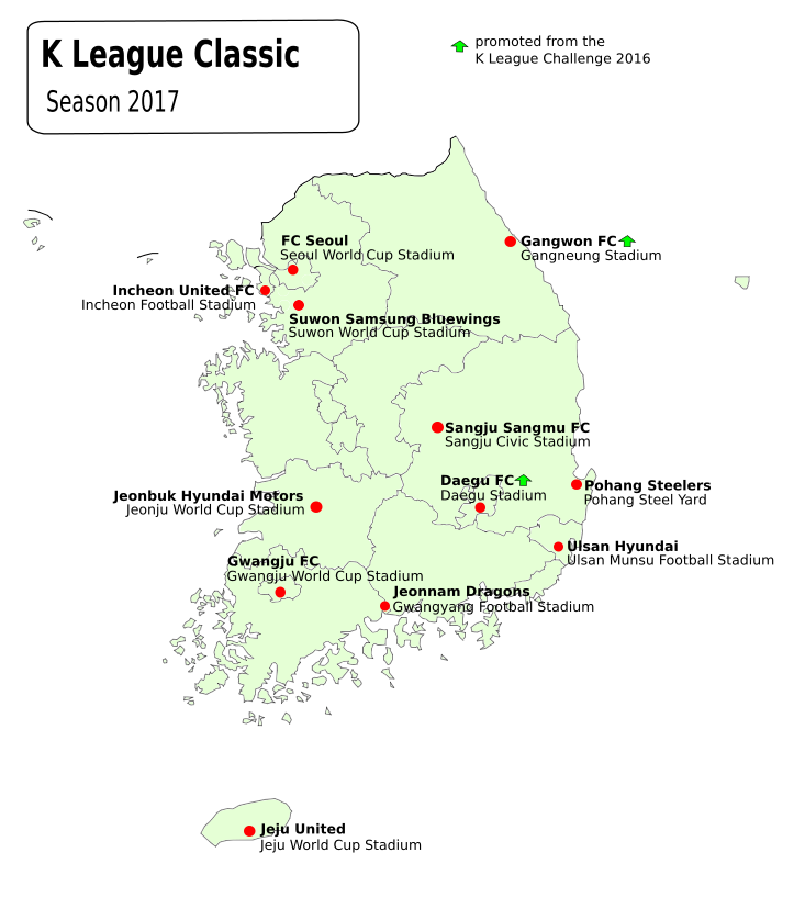 Playground of the K League Classic 2017